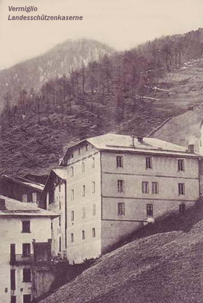 k.k. Landesschützensommerkaserne des II. Baons in Vermiglio